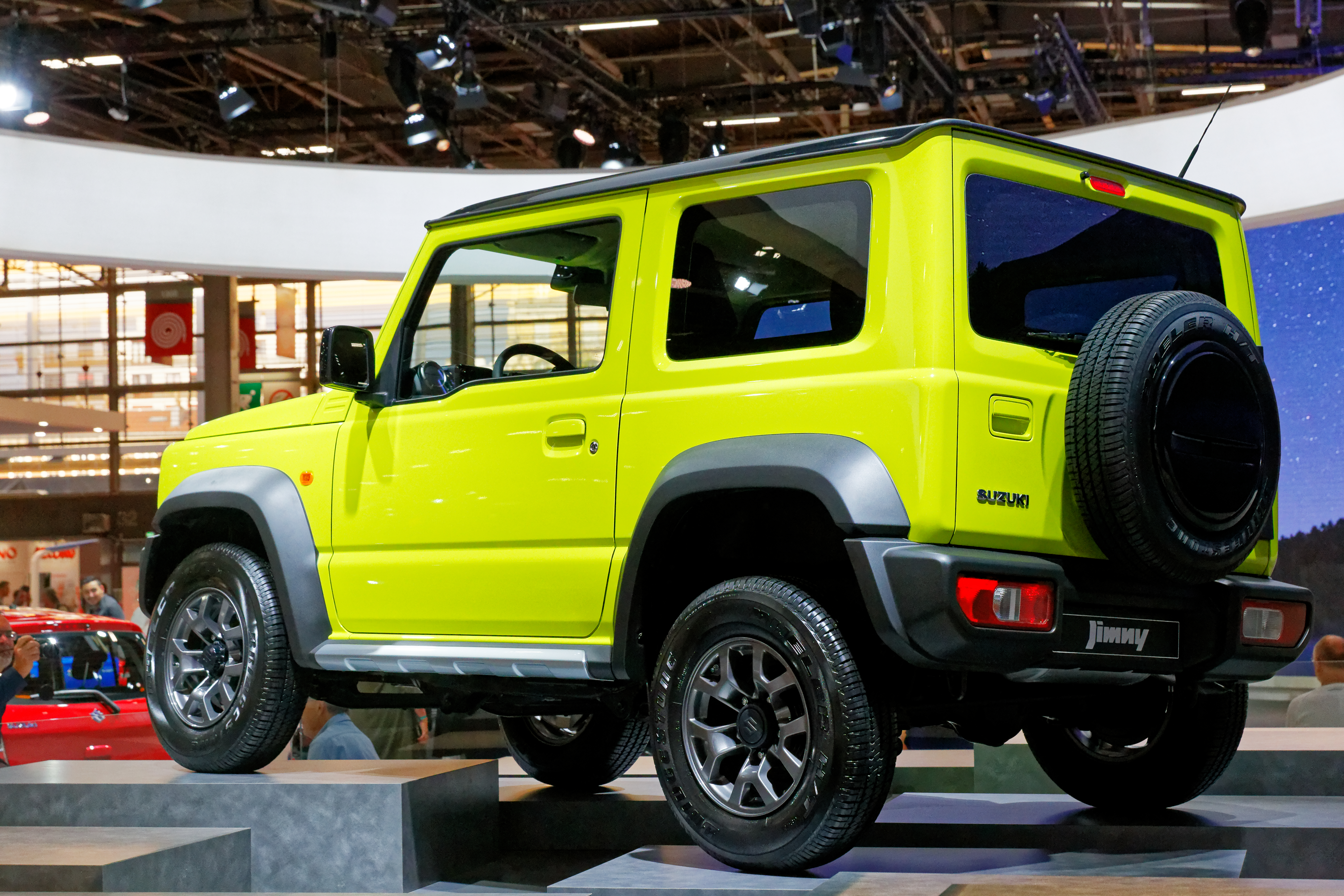 Une Suzuki Jimny exposée lors du mondial de l'automobile de Paris 2018.